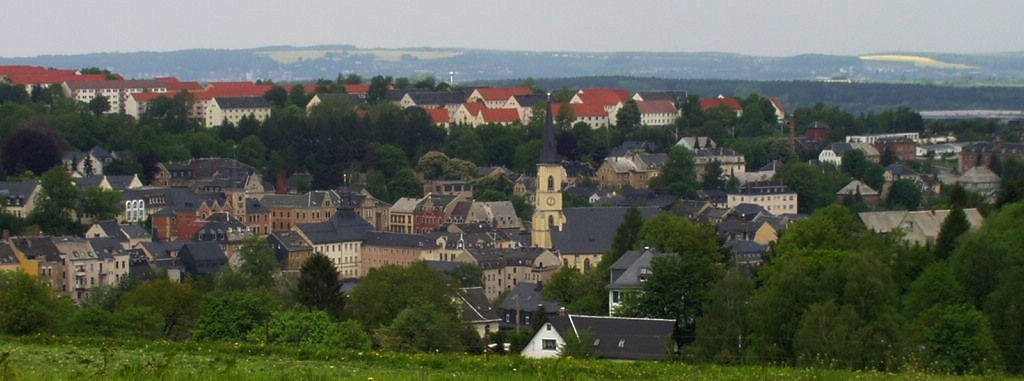 Blick auf den Stadtkern von Stollberg mit Jacobikirche, Marktplatz, Rathaus und Amtsgericht - Denkmalschutzgebiet Stollberg/Erzgeb.